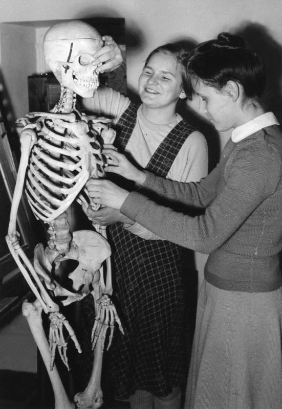 Blindenstudienanstalt Marburg/Lahn Im Biologieunterricht. Um den menschlichen Körper eingehend kennenzulernen, müssen die Blinden das Skelett abtasten. Den Schädel an der nicht vorhandenen Nase zu ziehen, macht natürlich viel Spass.